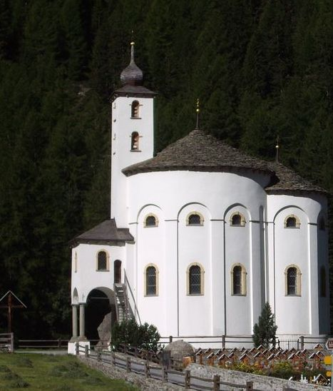 Kirche Mariä Himmelfahrt, Saas Balen, VS